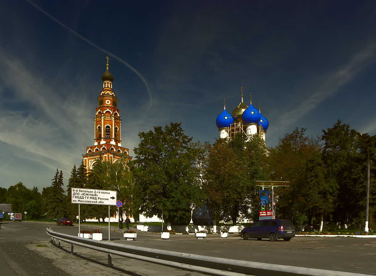 Бронницы. Собор Михаила Архангела